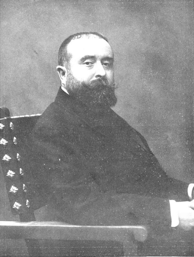 Figuras notable del Parlamento. Juan de la Cierva, obra del fotógrafo Kaulak.